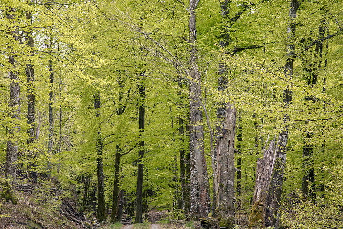 Vågsäter bokskog